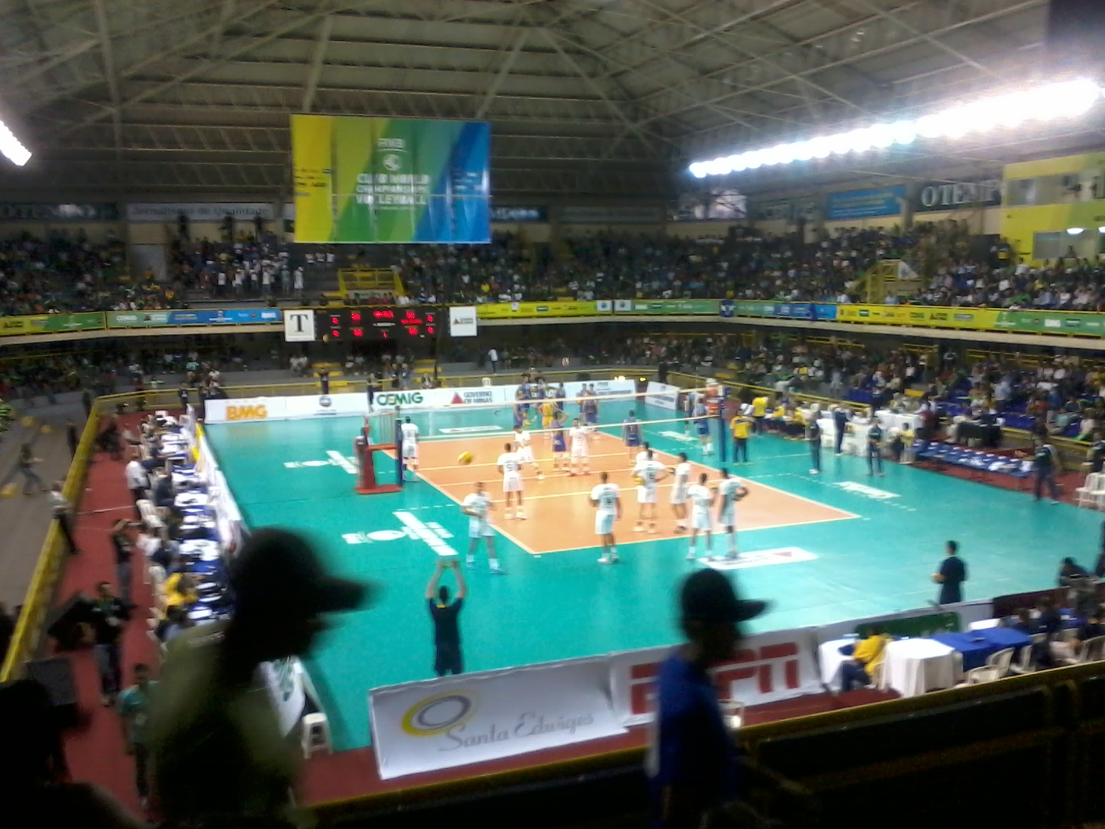 Semifinal do Campeonato Mundial de Clubes de Voleibol Masculino de 2013 entre Sada Cruzeiro e UPCN Voley Club (Ginásio Divino Braga, Betim)